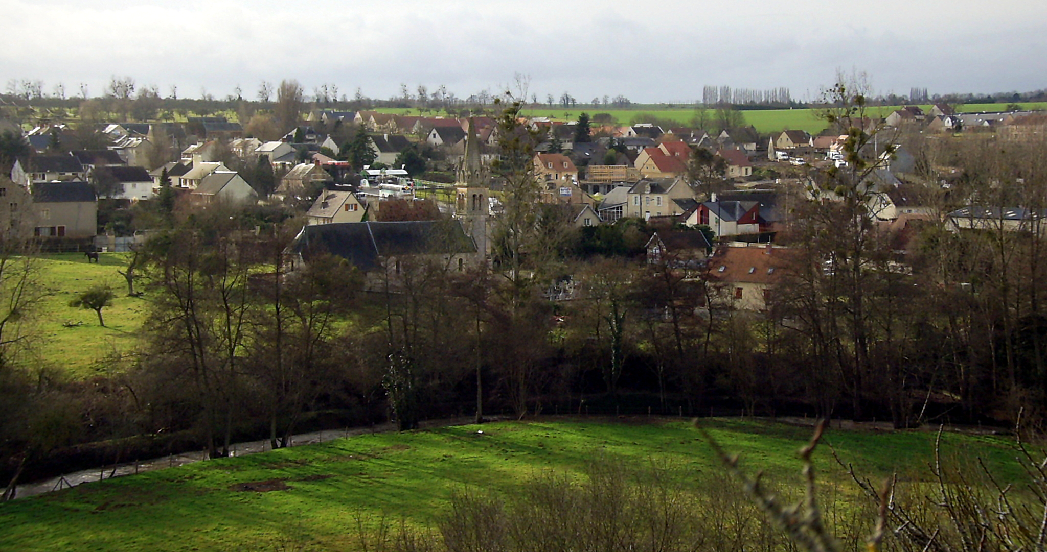 Vue partielle du village de Laize-la-Ville en Calvados.